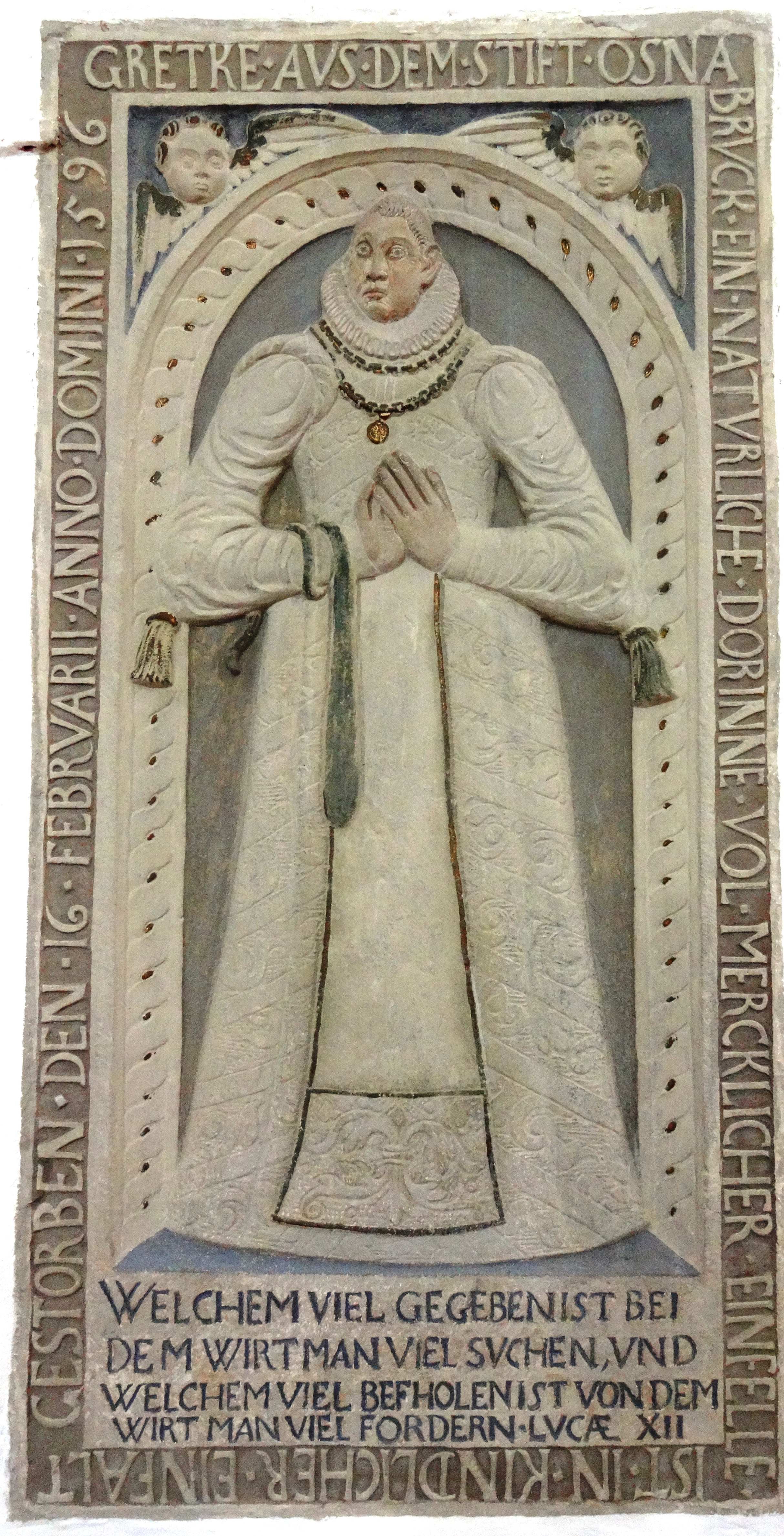 Grabplatte von Grekte, St. Johannis in Dannenberg, Jahr 1596